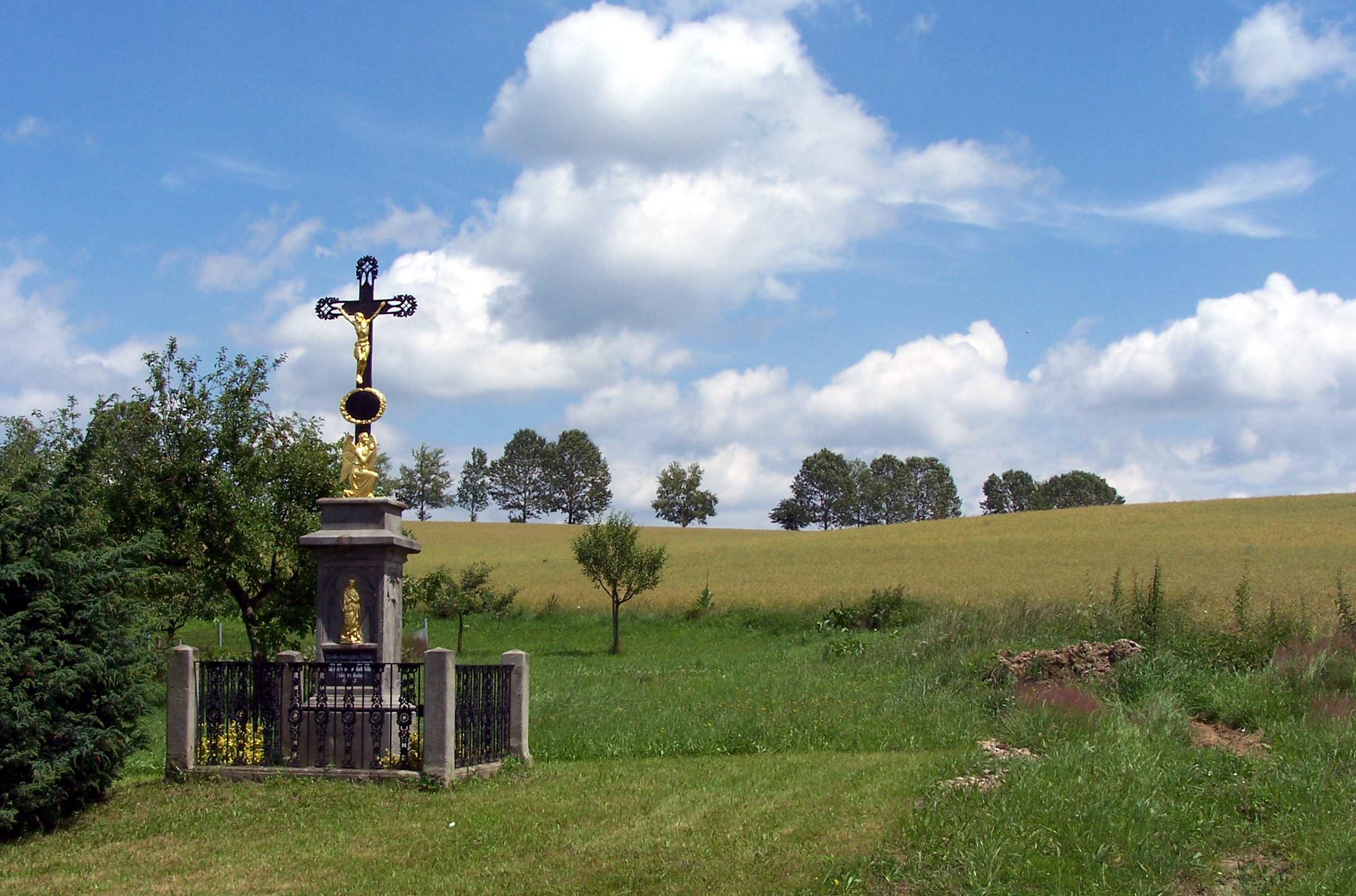 Obec Přívrat, kříž při při čp. 48.